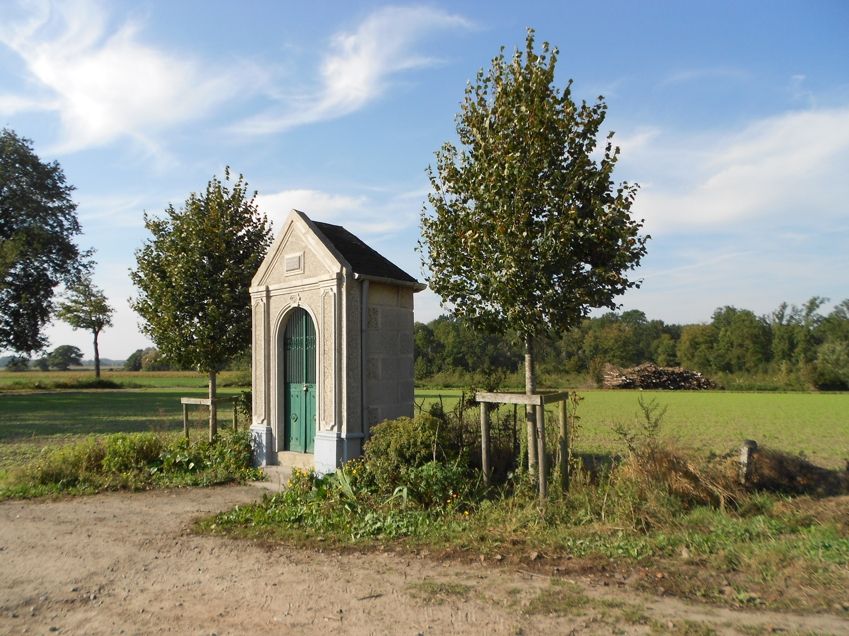 La chapelle Baligand au sud de la forêt domaniale de Flines-lès-Mortagne